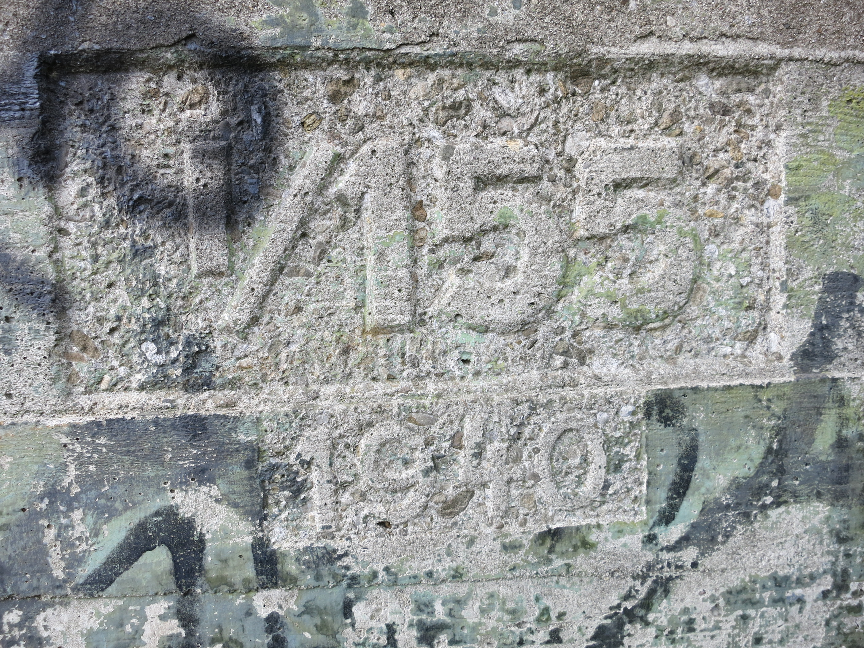 Stadtkommando Zürich ZH, Schweiz